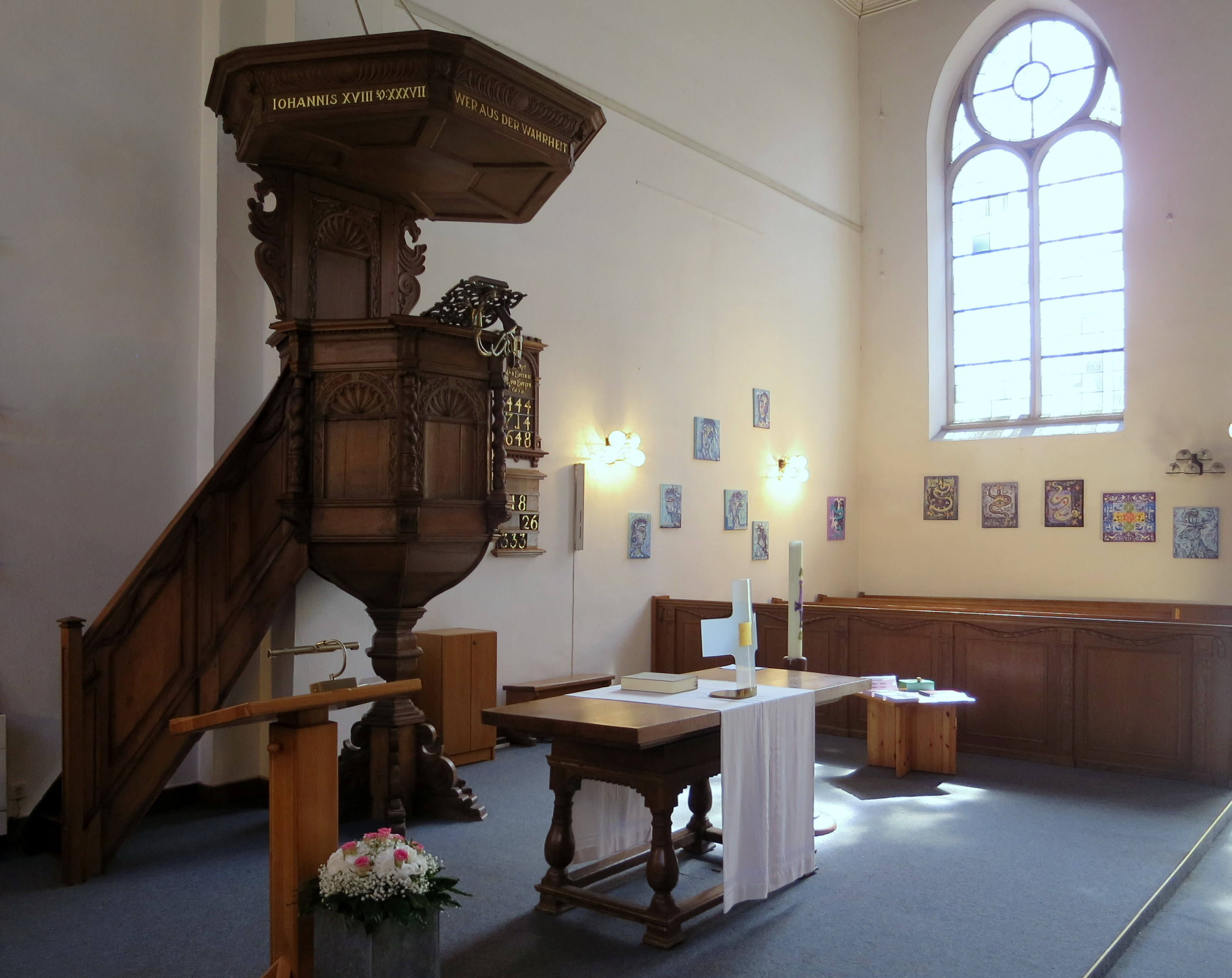 Das ist die Kanzel und der Altartisch der evangelisch-reformierten Kirche in Xanten